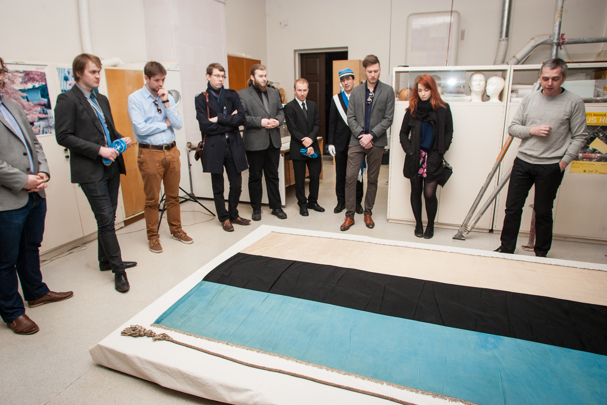 Eesti Üliõpilaste Seltsi ajalooline lipp Eesti Rahva Muuseumis.